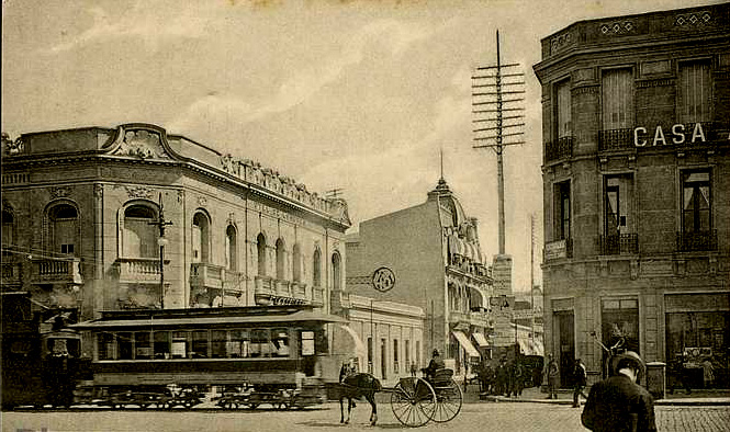 Tranvia a Vapor Bahía Blanca.